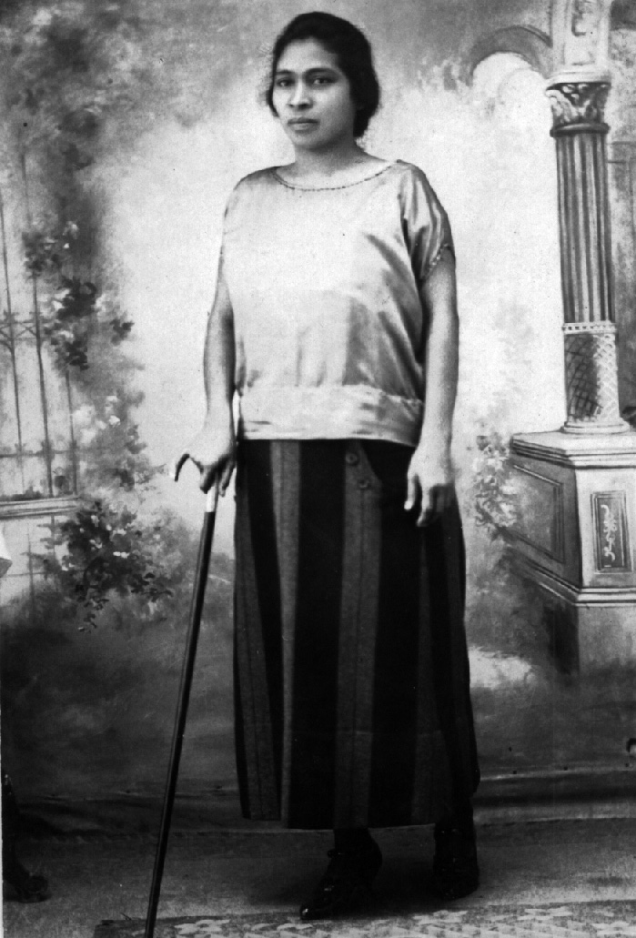 Fotografía de Prudencia Ayala (1885-1936), escritora y activista social salvadoreña